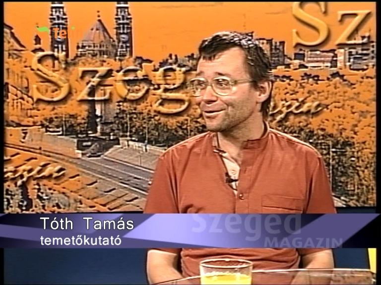 Tóth Tamás történeti kutató a Telin TV stúdiójába, Szegeden